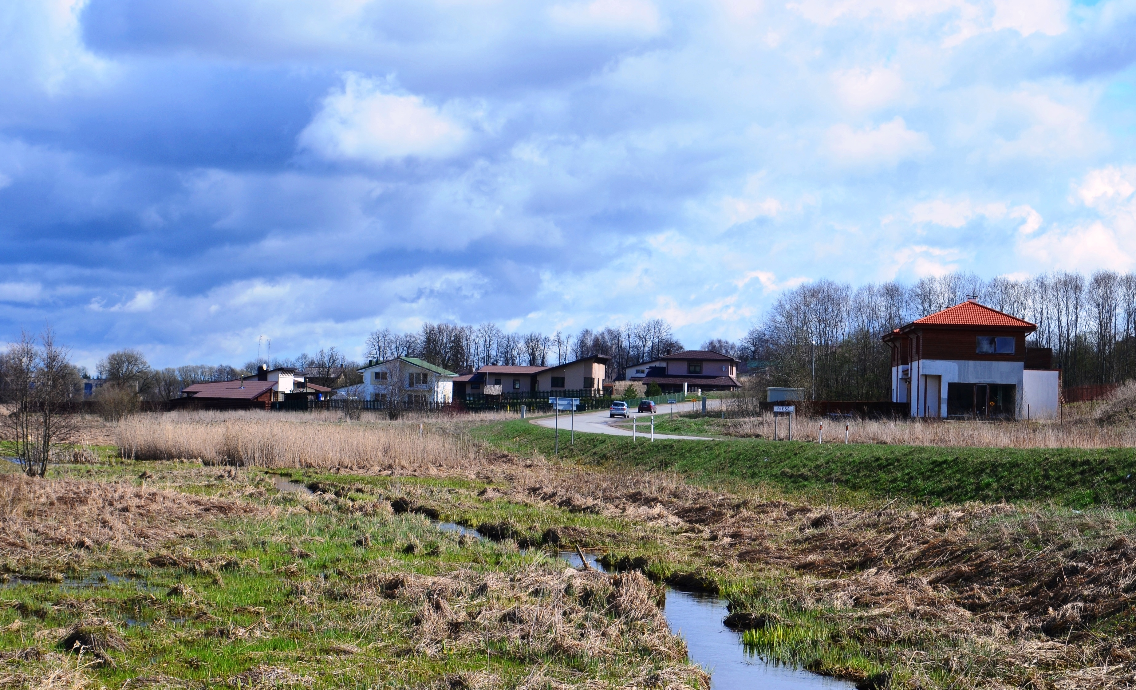 Riešės upė ir Riešės k., Vilniaus raj.